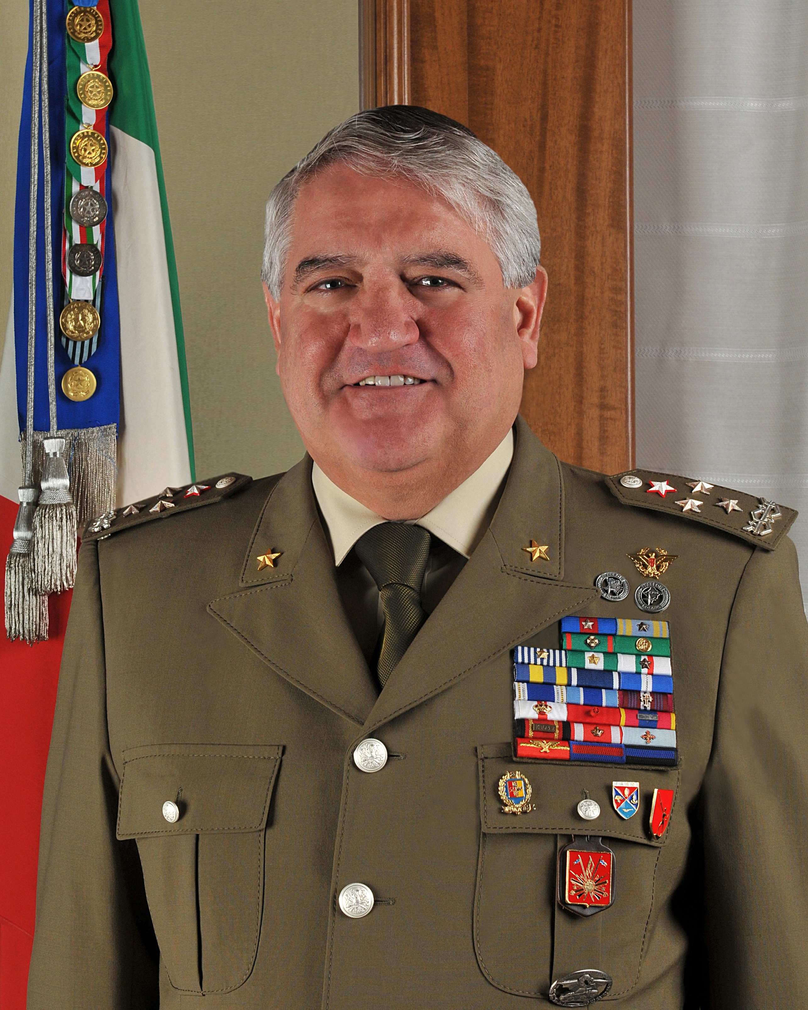 Giuseppe Valotto Capo di stato maggiore dell'Esercito italiano (2009-2011).